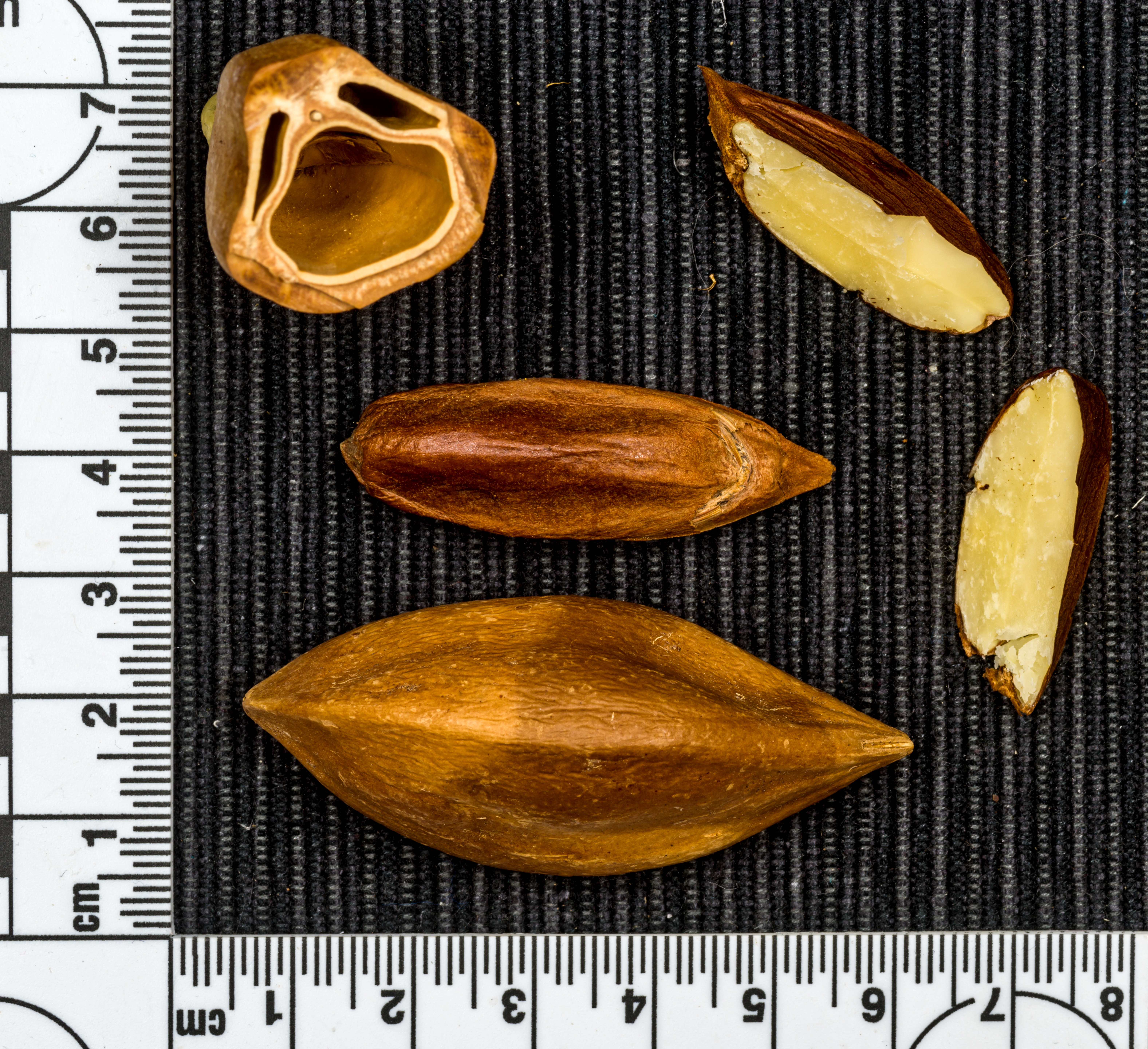 Früchte des Canarium ovatum der Name in der Heimat werden sie Kedongdong genannt, hier heißen sie Pilinuss auch wenn es eine Steinfrucht ist mit einer Länge von 3,5 bis 7 Zentimeter und einem Durchmesser von 2,3 bis 3,8 Zentimeter is Sie ist eiförmig bis ellipsoid, spitz und im Querschnitt dreieckig. Bei Reife besitzen die Früchte ein Gewicht zwischen 15,7 und 45,7 g.